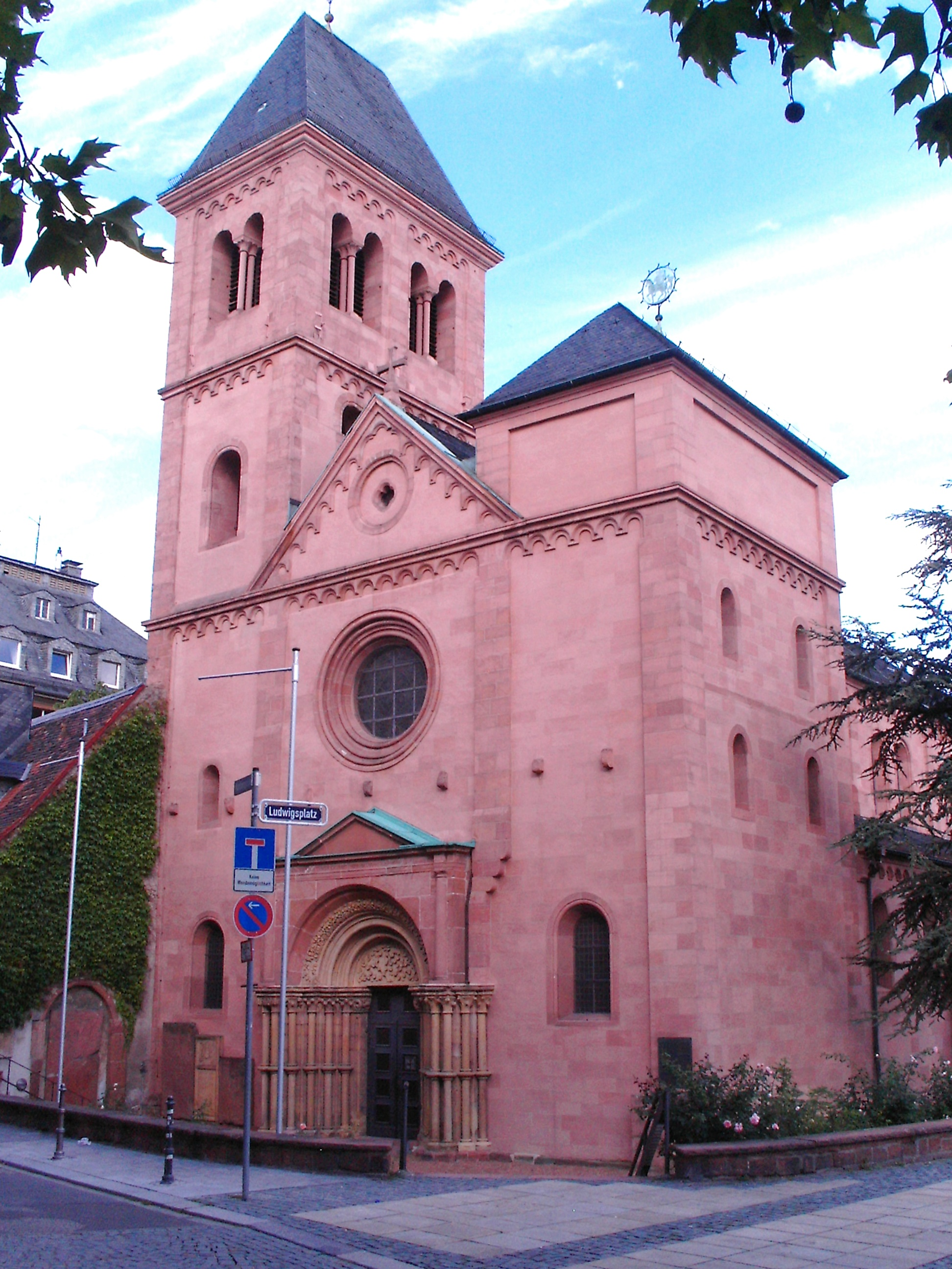 Martinskirche Worms, von Westen